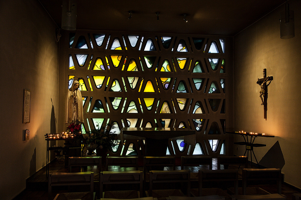 Marienkapelle der St. Agatha-Kirche Aschaffenburg